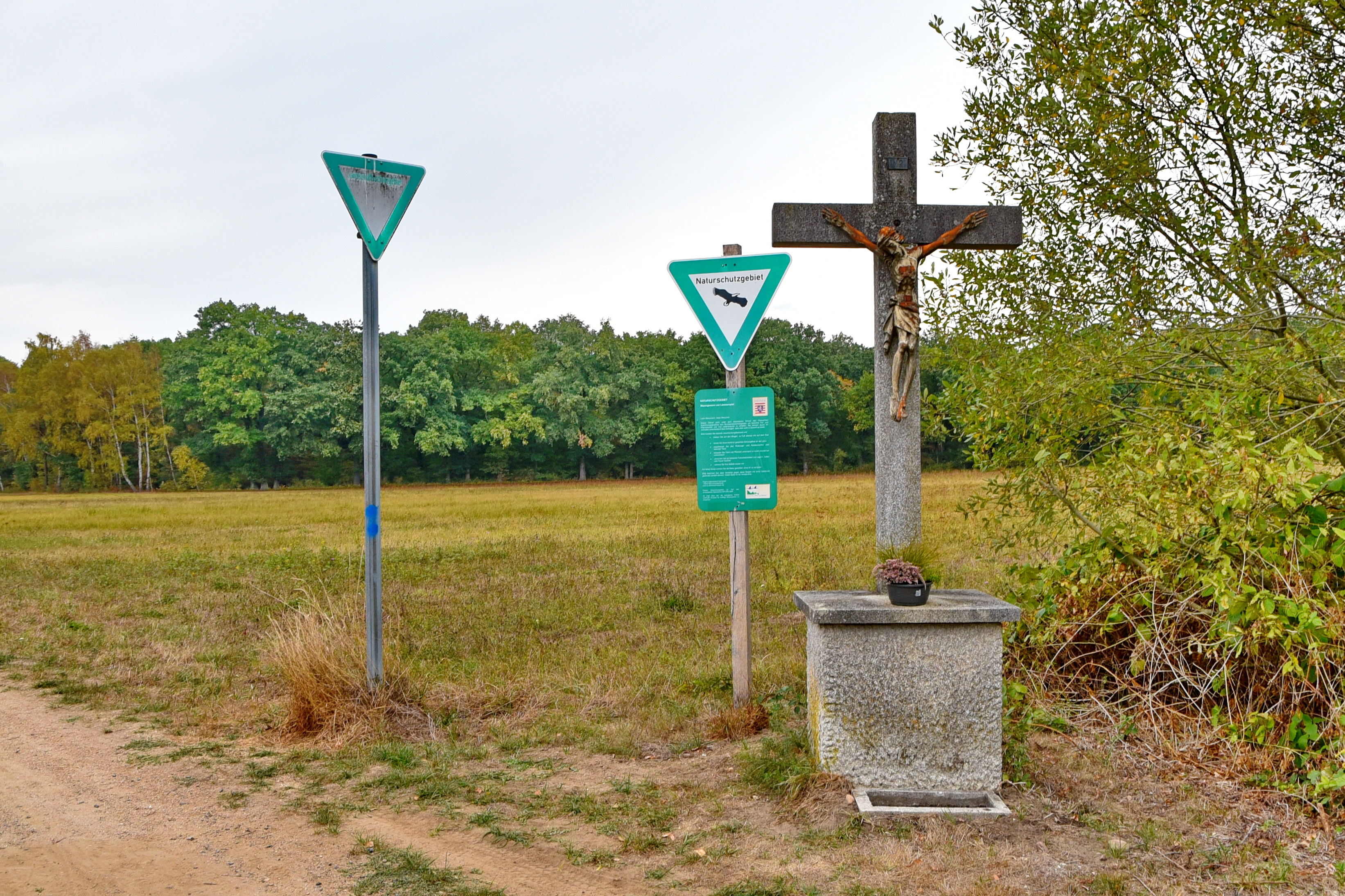 Das Naturschutzgebiet Mayengewann von Lämmerspiel (NSG-Kennung 1438009) liegt im hessischen Landkreis Offenbach. Es umfasst einen etwa 6,69 Hektar großen Wald- und Wiesenbestand, der sich im Stadtgebiet von Lämmerspiel befindet. Das Naturschutzgebiet liegt am östlichen Ortsrand des Mühlheimer Stadtteils Lämmerspiel. Artenreicher Eichenwald und angrenzend wechselfeuchte Wiesen charakterisieren das NSG Mayengewann von Lämmerspiel. Es trägt die FFH Bezeichnung 5819-301 Mayengewann von Lämmerspiel (FFH-Gebiet) und steht als Natura 2000-Gebiet unter besonderem Schutz.